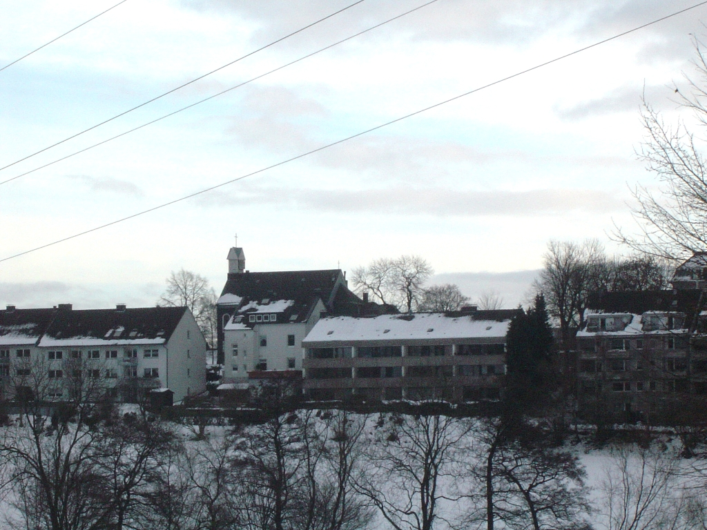 Die evangelische Kirche Hottenstein, Wuppertal-Nächstebreck selbst fotografiert von Pitichinaccio, 03-12-2005